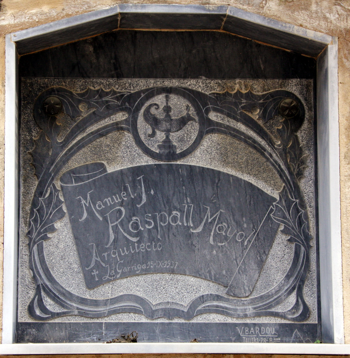 Tomba de Joaquim Manuel Raspall, ubicada al cementiri de la DOma, la Garriga (Catalunya)